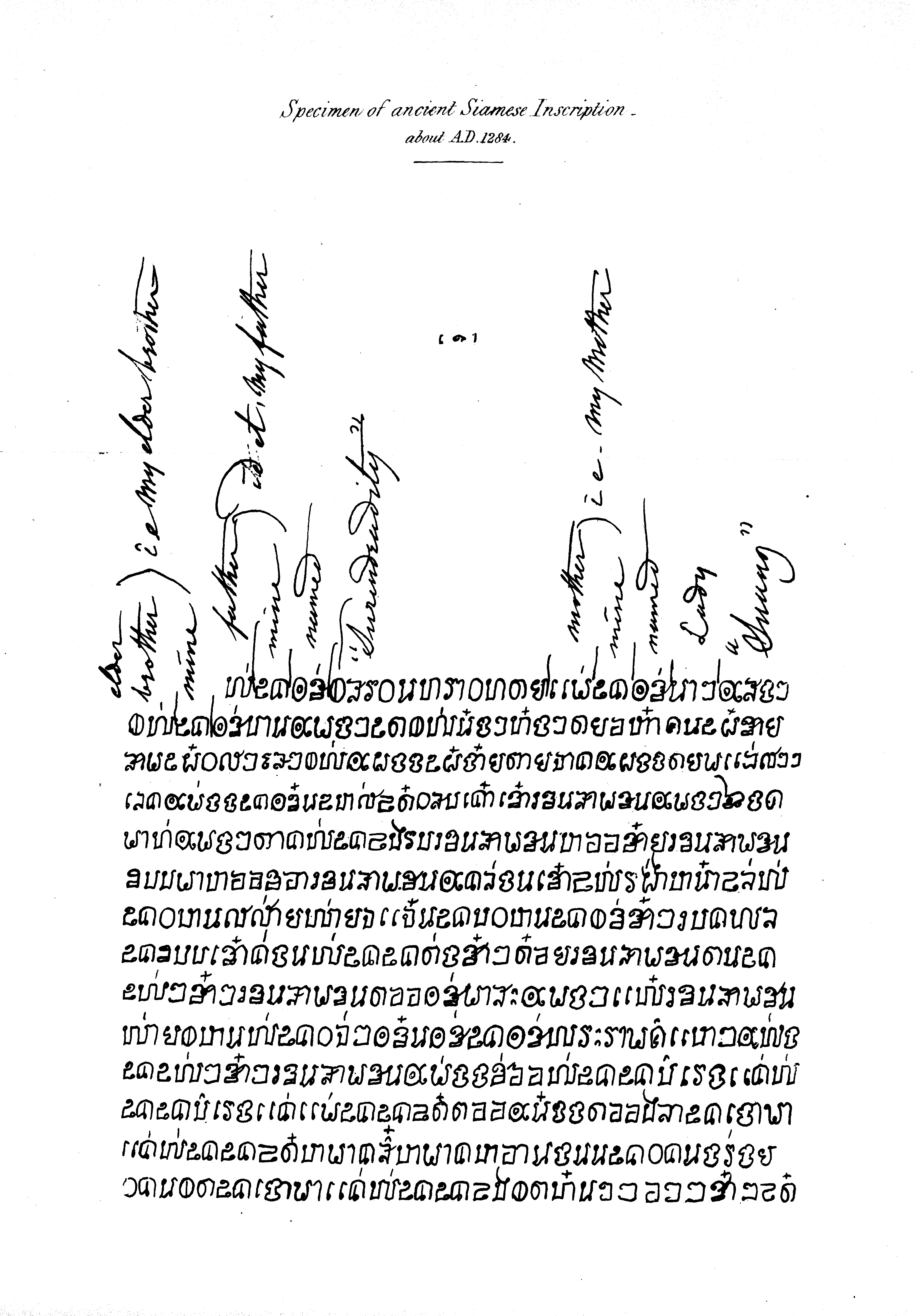 ศิลาจารึกสมัยพ่อขุนรามคำแหงที่เขียนกำกับความหมายโดยพระบาทสมเด็จพระจอมเกล้าเจ้าอยู่หัว รัชกาลที่ 4 โดยภาพนี้ถูกตีพิมพ์ลงหนังสือราชอาณาจักรและราษฎรสยาม ของเซอร์จอห์น เบาริ่ง ในปี 1855